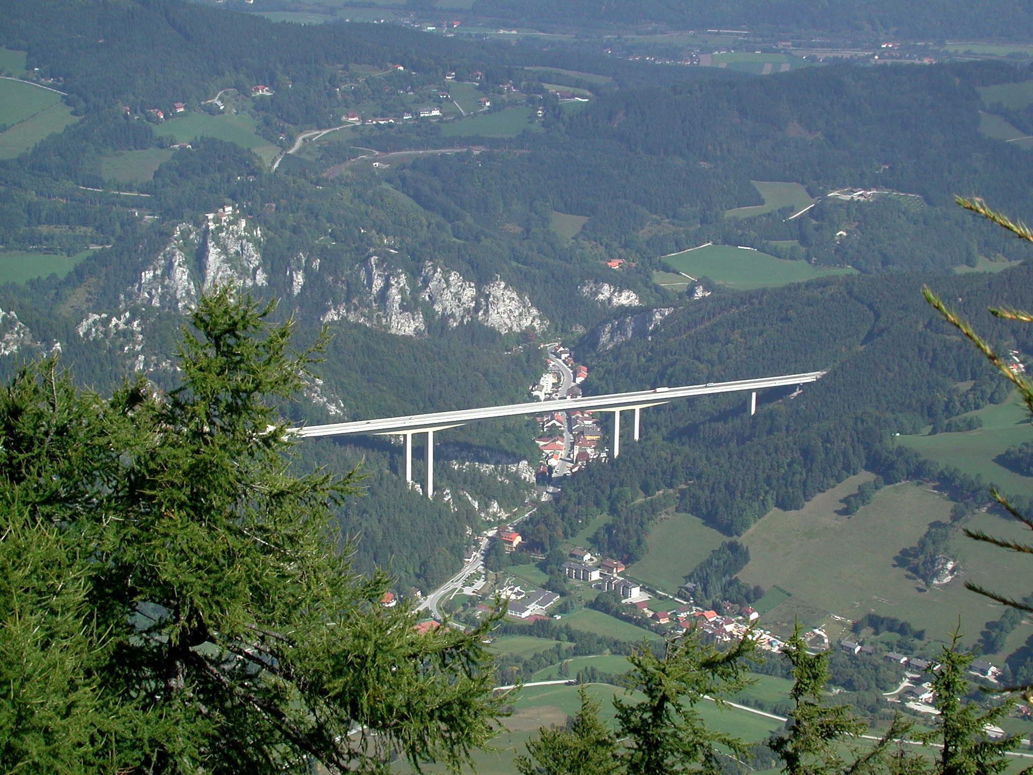 Schottwien at the Semmering pass in Lower Austria with S6 motorway bridge above the village - Schottwien am Semmering mit Brücke der Semmeringschnellstraße S6 über dem Dorf.